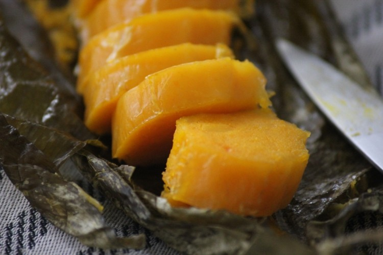 gateau de manioc recette camerounaise This is an image of food from Cameroon